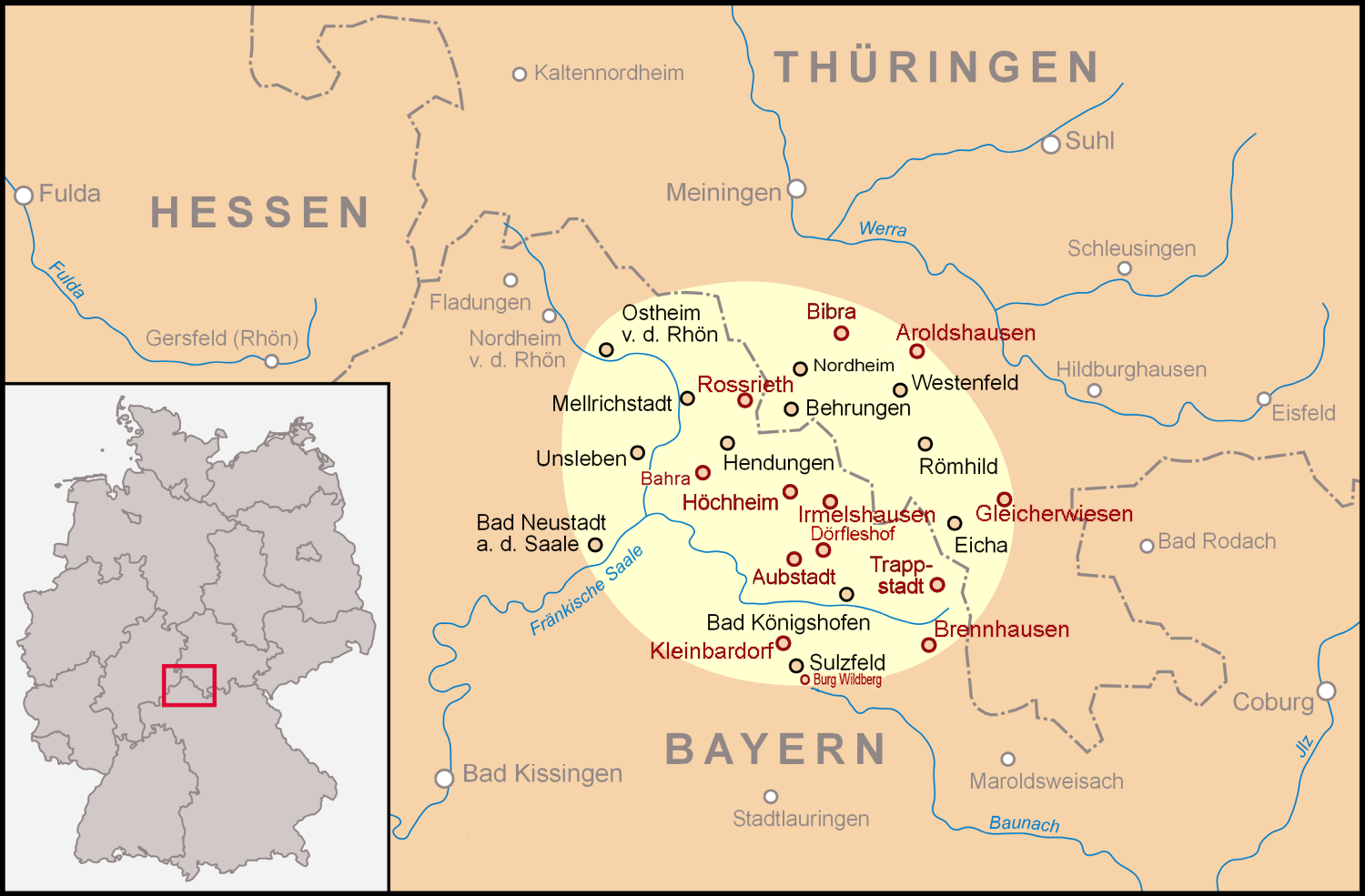 Region Grabfeld